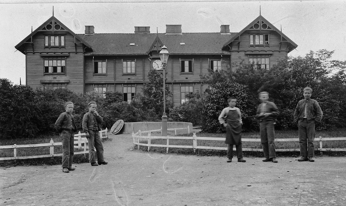 Hovedbygning ved Toftes Gave. Foto: Sannsynligvis Albert Steen, 3. juli 1903 (Deponert hos Domkirkeodden fra Fylkesbiblioteket. Inventarnr. HHB-00606.)